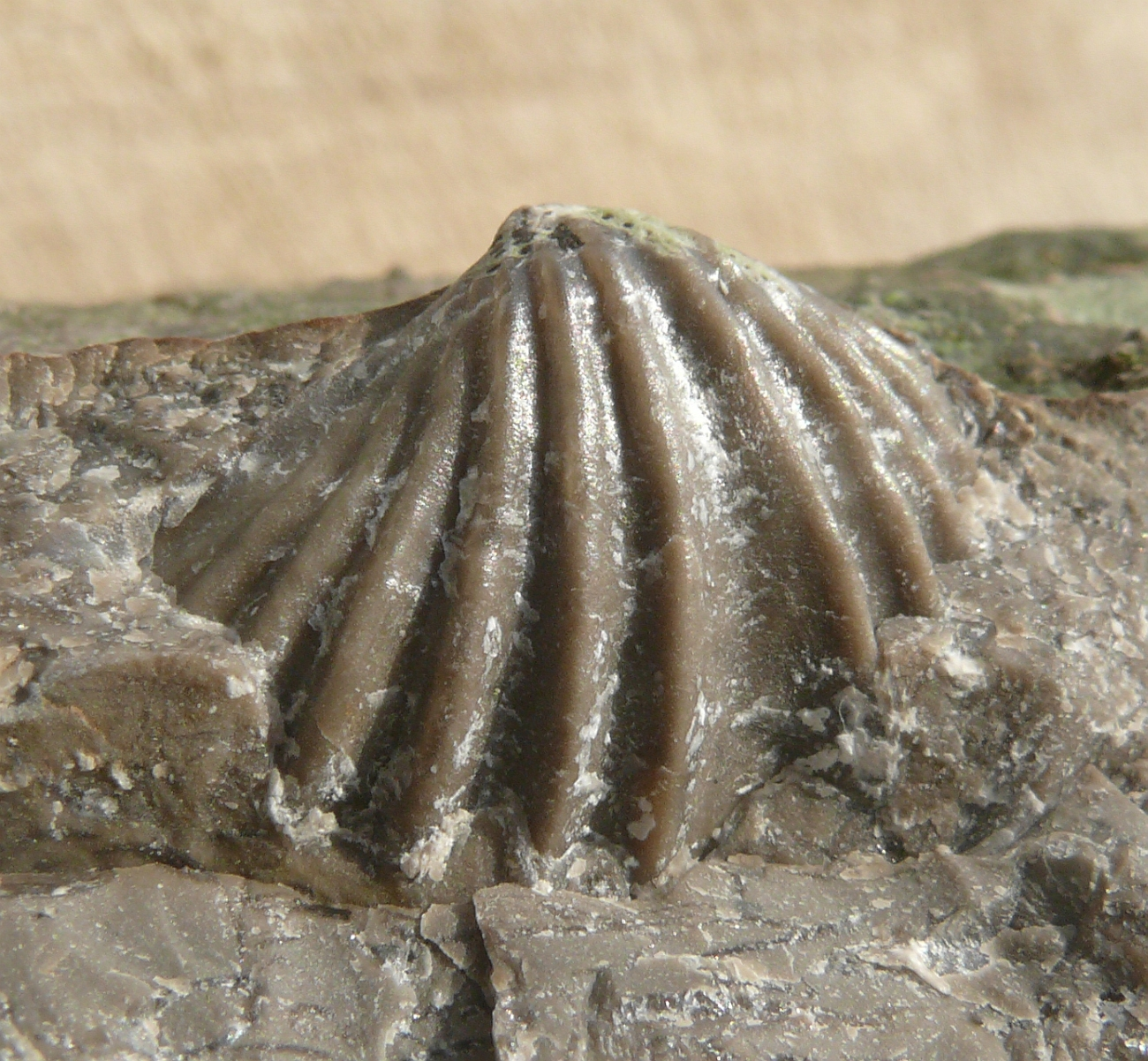 Punctospirella fragilis (Syn. Spiriferina fragilis), ventrale Klappe aus der Spiriferinabank, Trochitenkalk-Formation, Hohenlohe, Deutschland